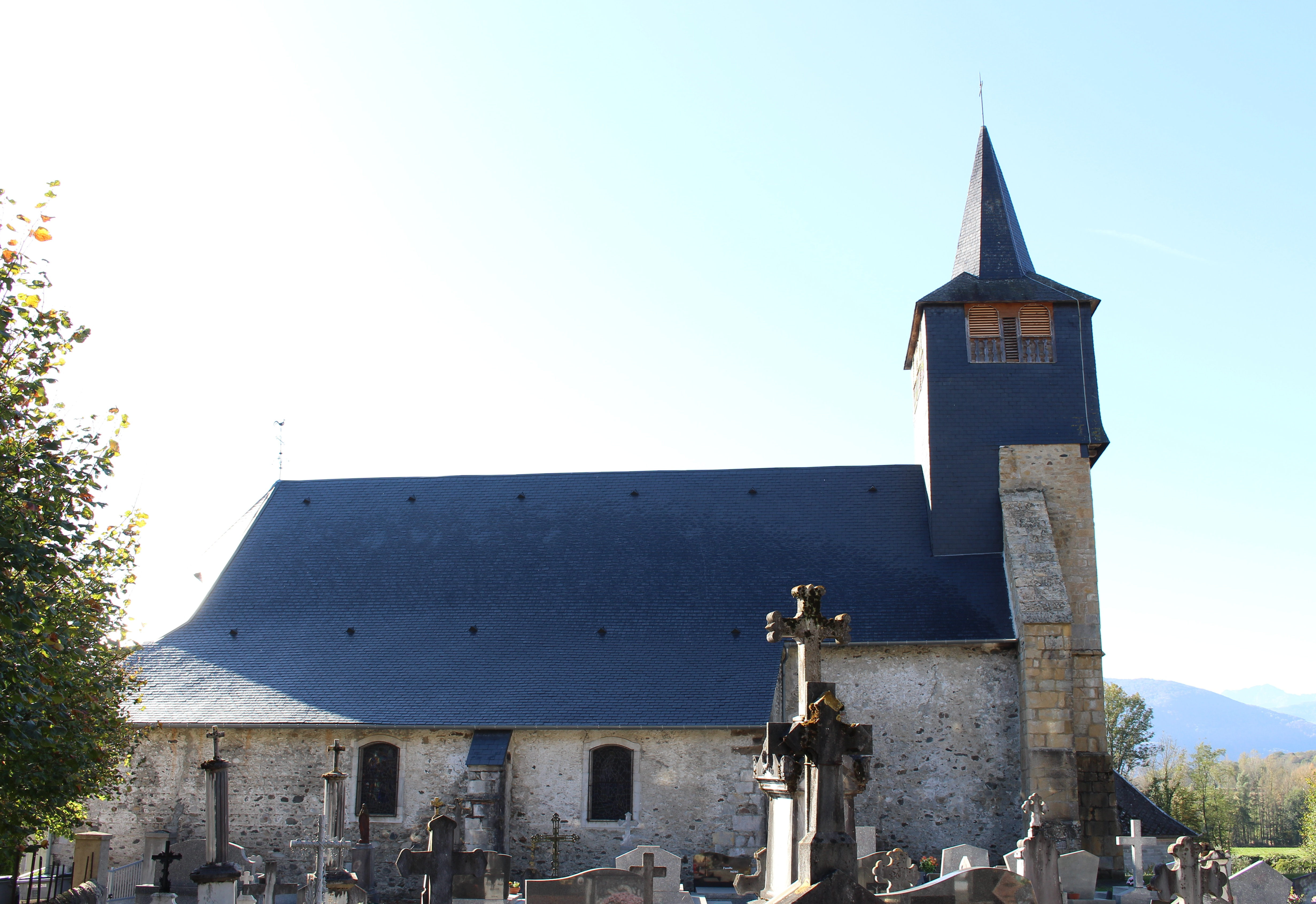 Église Notre-Dame-de-l'Assomption de Tuzaguet (Hautes-Pyrénées)